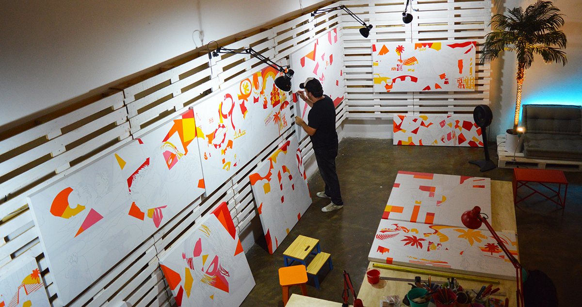 Artista Lobo pintando